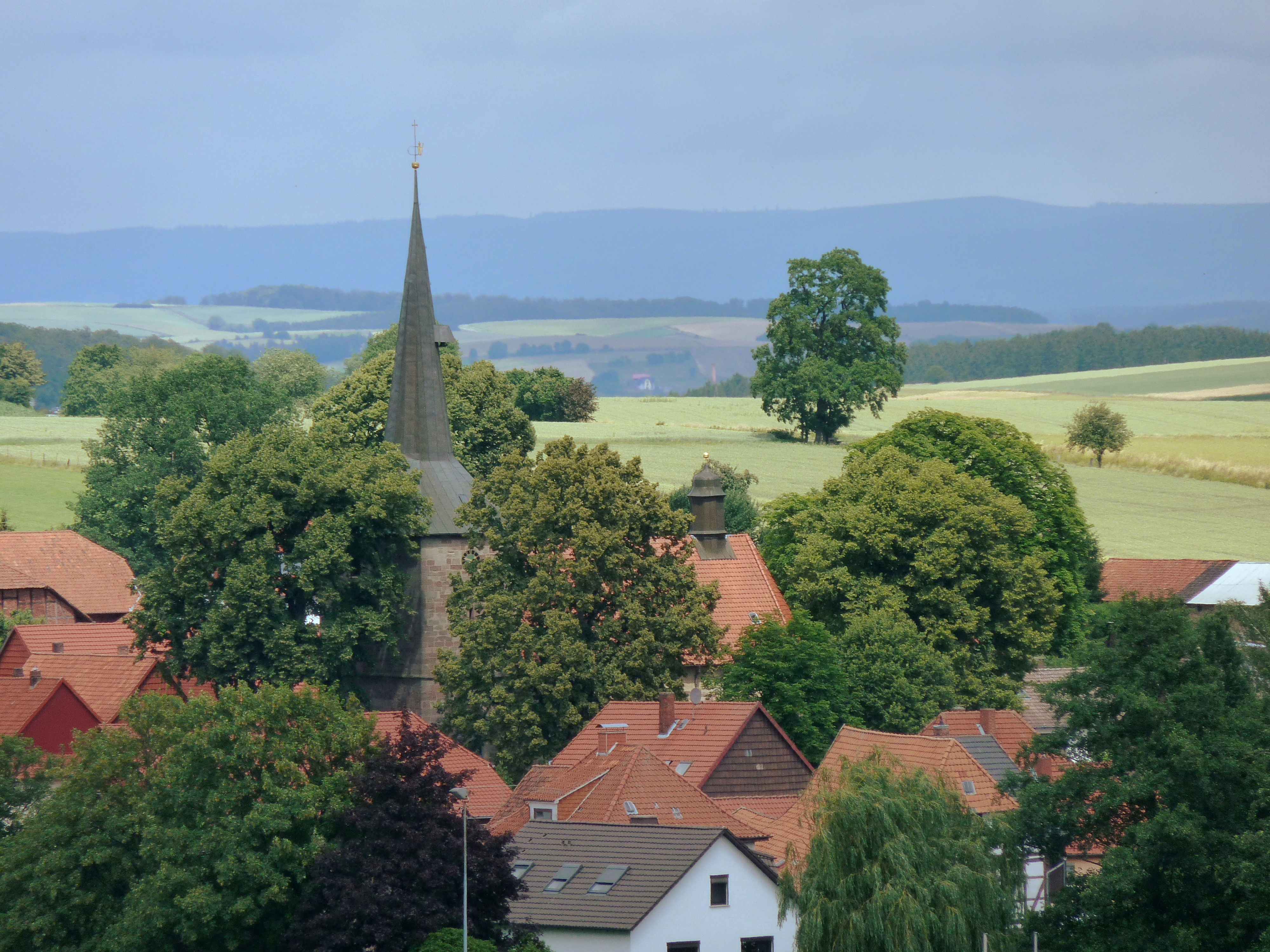 Blick über das Ortszentrum von Krebeck, Eichsfeld. Blick von Südwesten vom Hang des Lohbergs